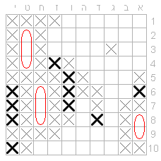 טקטיקה - שימת לב לצי היריב במשחק צוללות